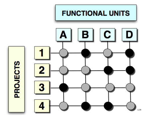 Afbeelding van een matrix organisatie. Mei 2006 Laurens van Lieshout.